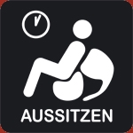 Logo des Linz09-kritischen Projektes "Aussitzen"